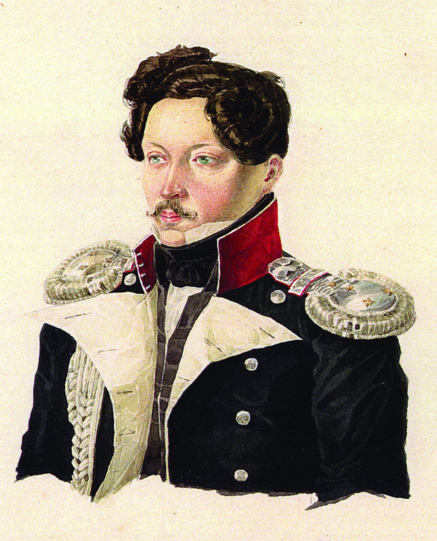 Неизвестный художник. Портрет Николая Васильевича Путяты 1831 г. Бумага, акварель (?) Музей-заповедник Мураново.